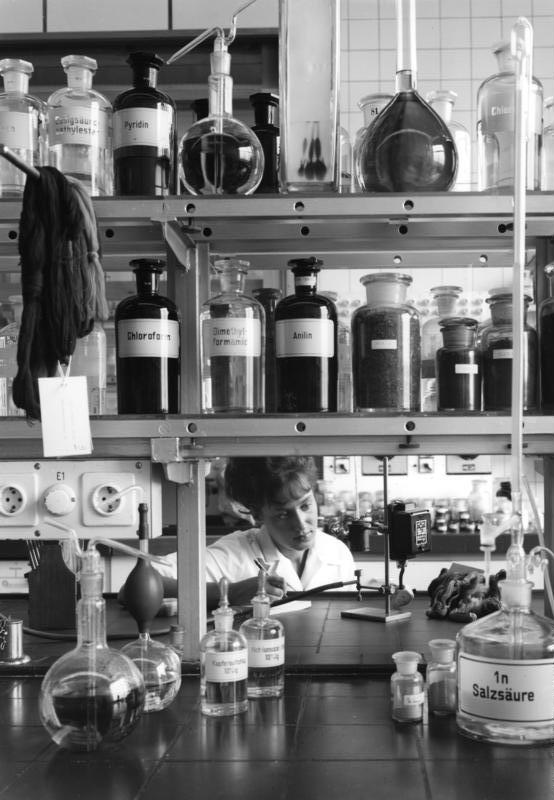 Färbeversuche im Wissenschaftlichen Hauptlaboratorium der Farbenfabriken Bayer, Leverkusen